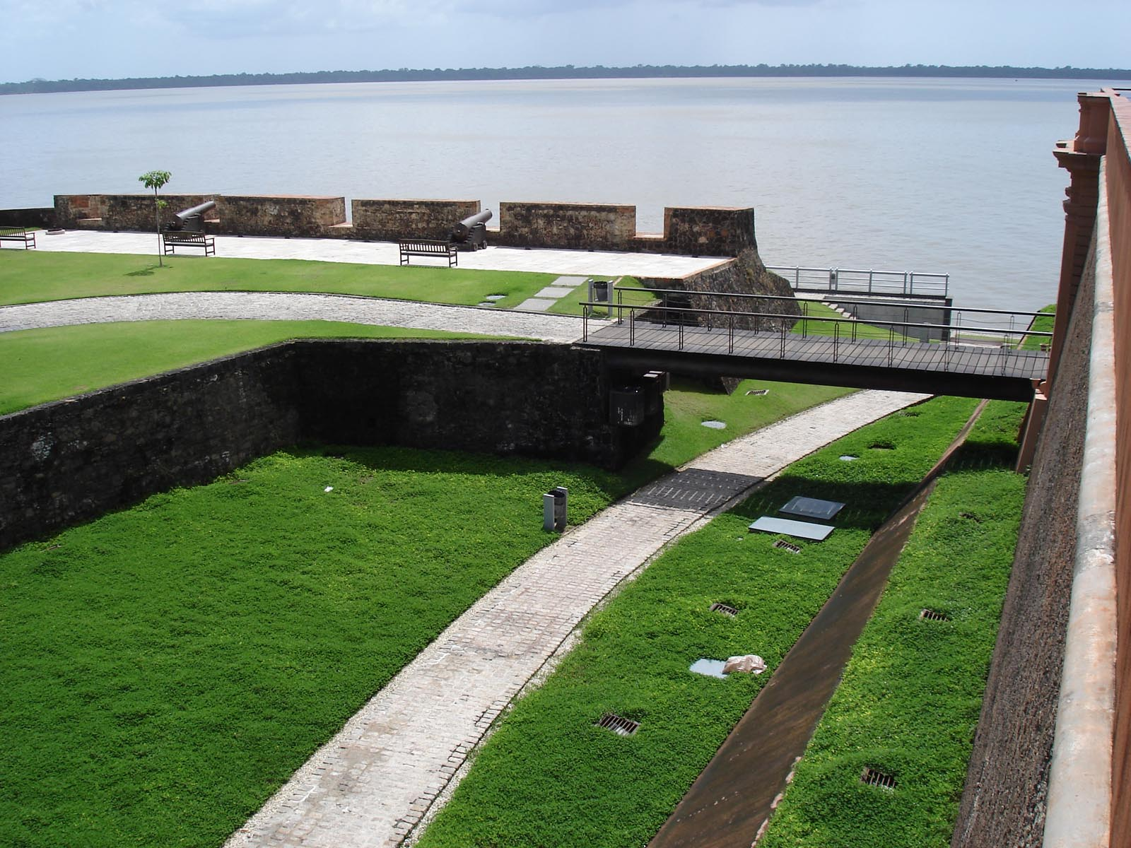 Forte do Presépio de Belém, estado do Pará, Brasil.